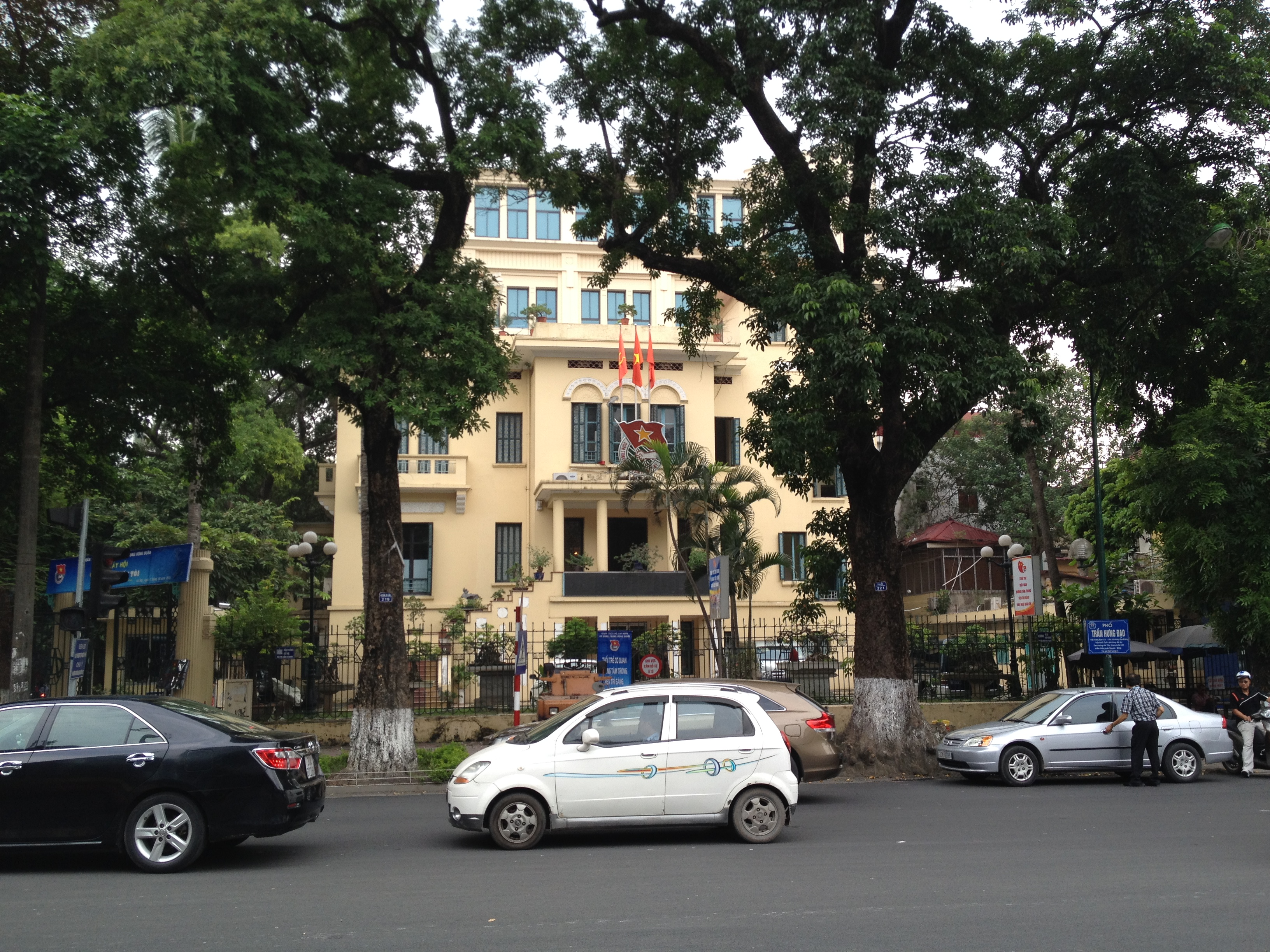 Hà Nội, Việt Nam.